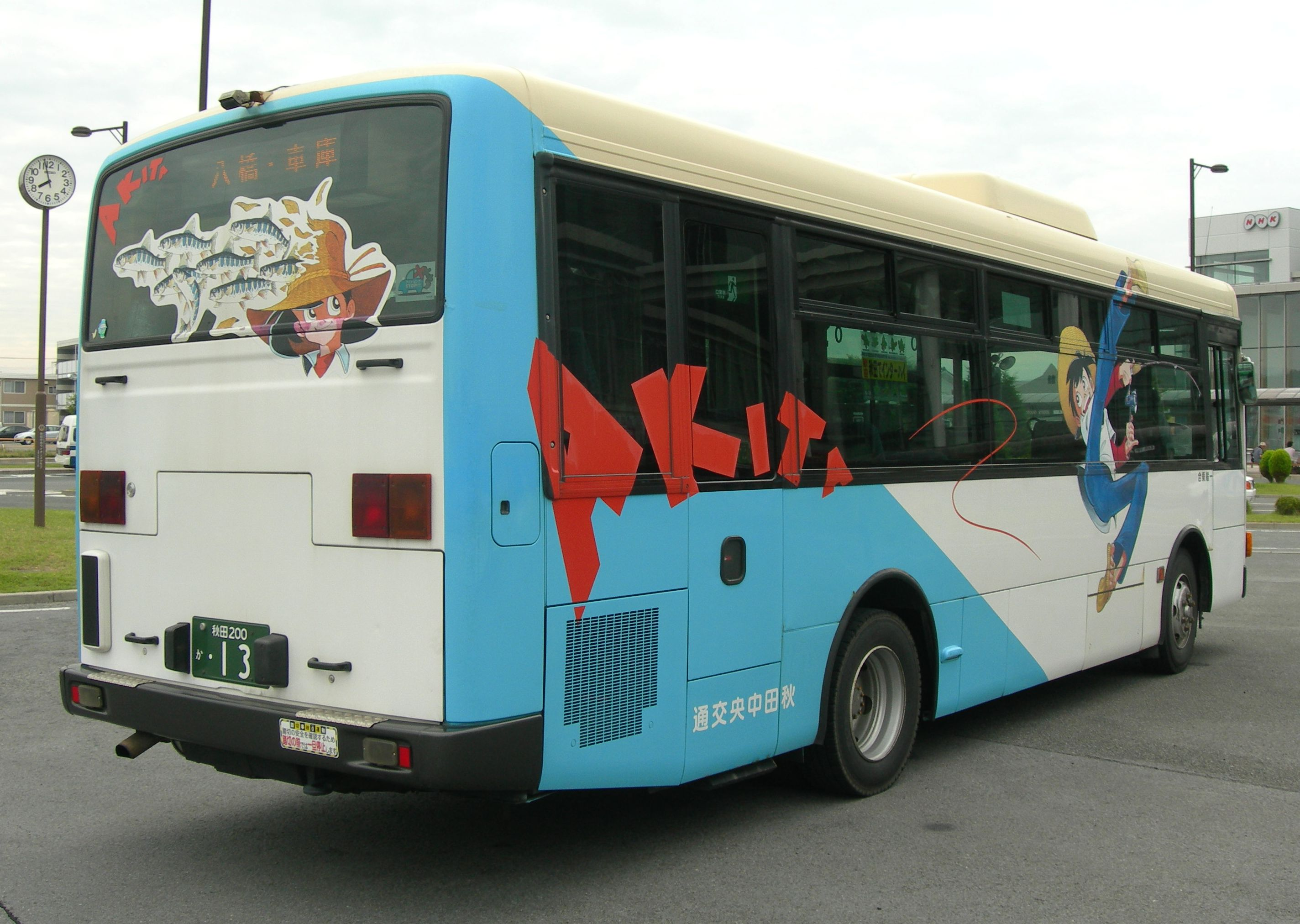 秋田中央交通 『釣りキチ三平』 路線バス